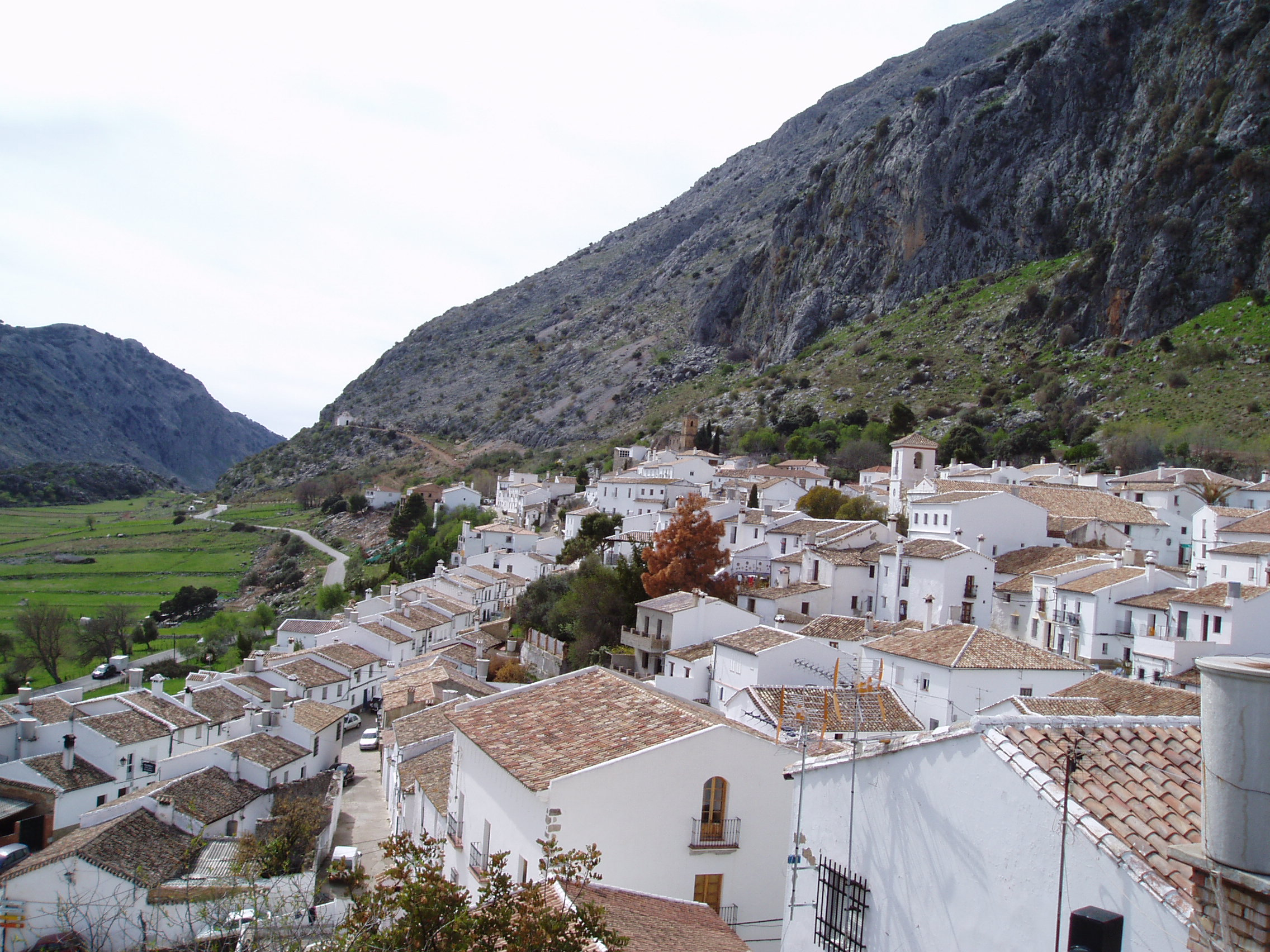 Imagen de Villaluenga del Rosario, municipio de la provincia de Cádiz en el Parque Natural de la Sierra de Grazalema. Es el municipio situado a mayor altitud de la provincia.